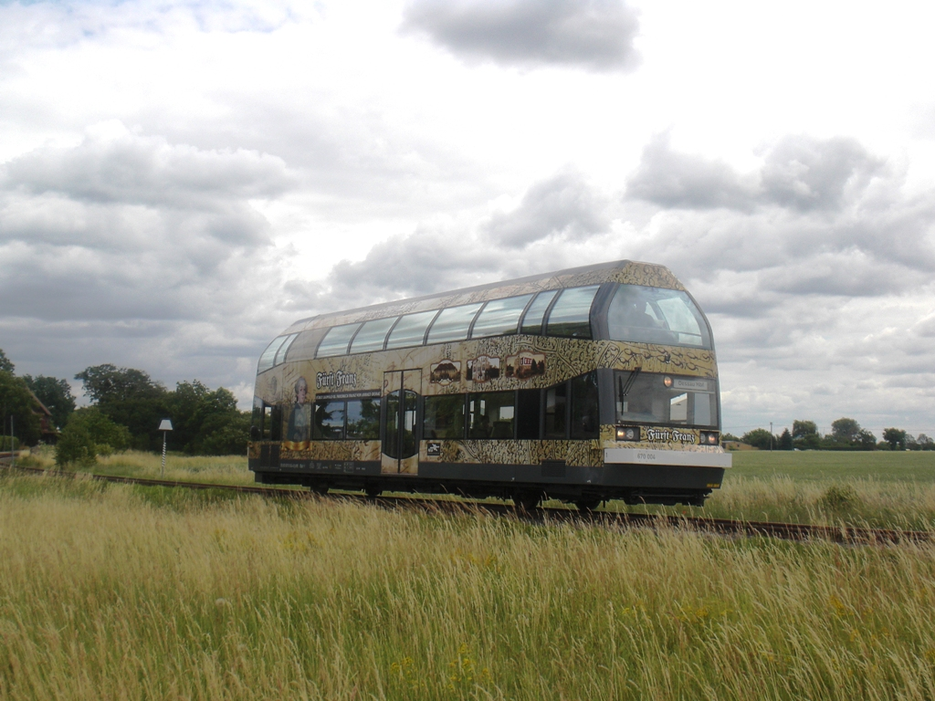 DWE-Wagen 670 004 auf dem Weg von Wörlitz nach Dessau, aufgenommen am 19.06.2011